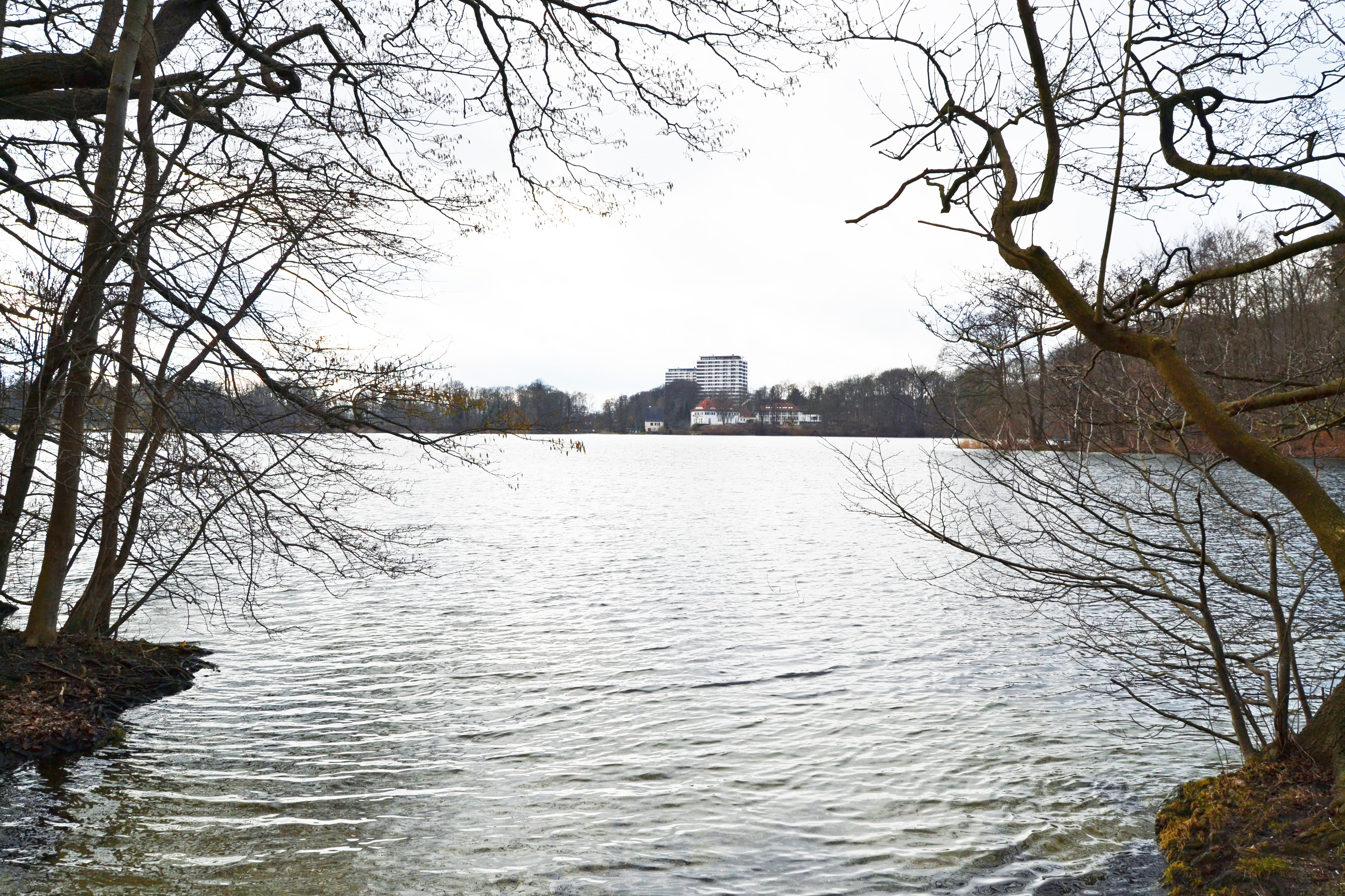 Plön, Höftsee in Richtung Ölmühle